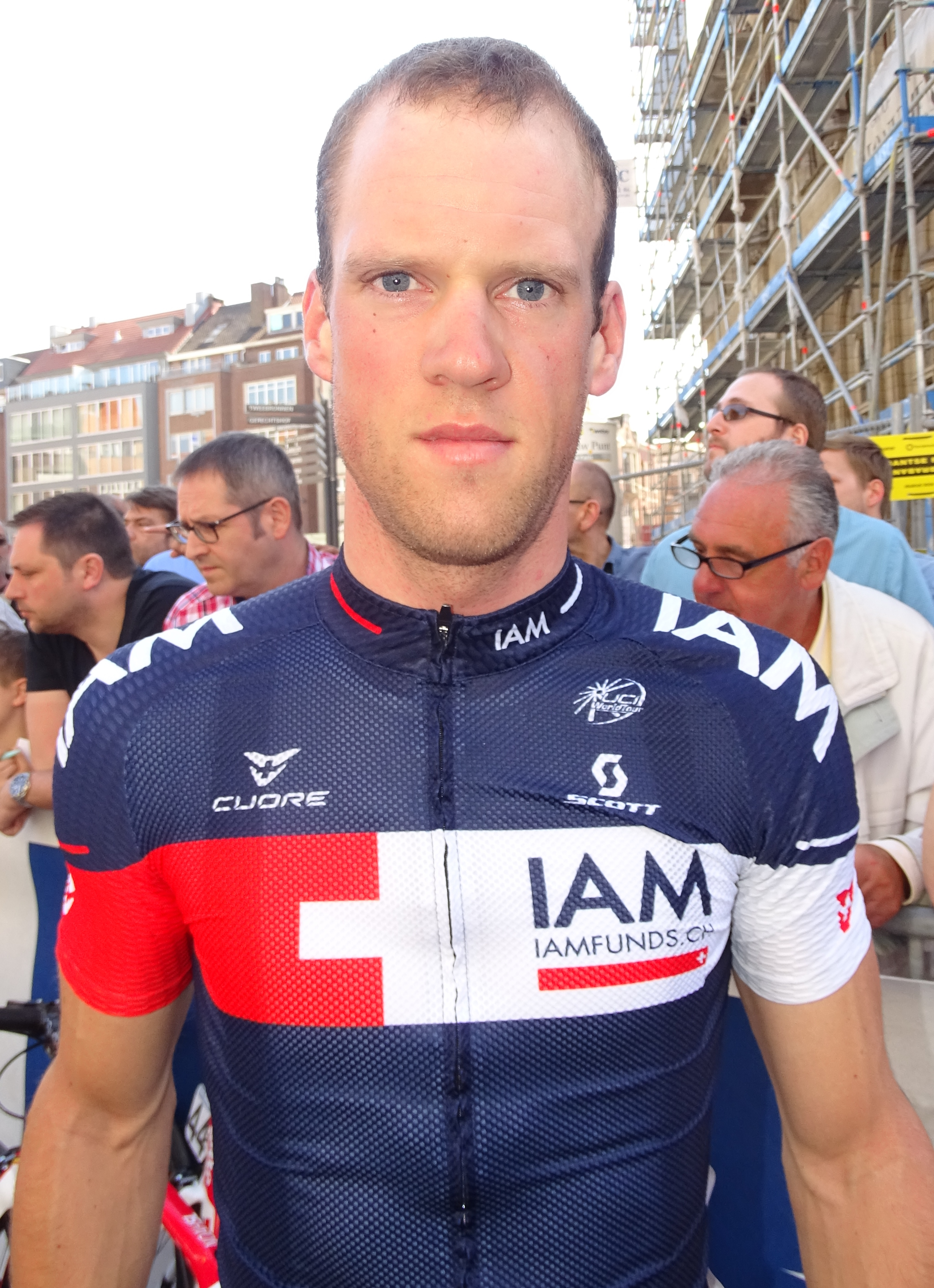 Reportage réalisé le mercredi 15 avril à l'occasion du départ de la Flèche brabançonne 2015 à Louvain, Belgique.